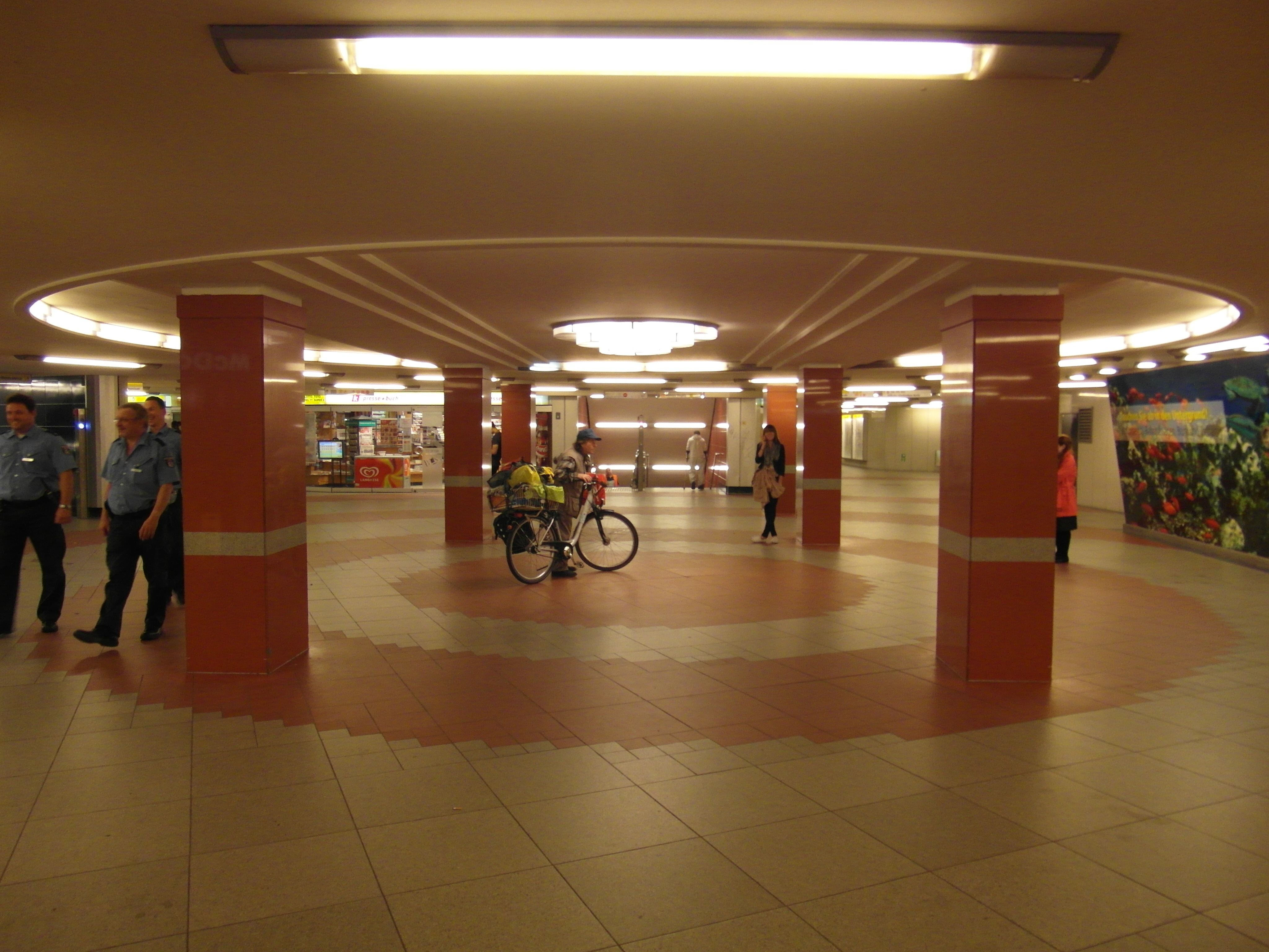 Verteilerebene